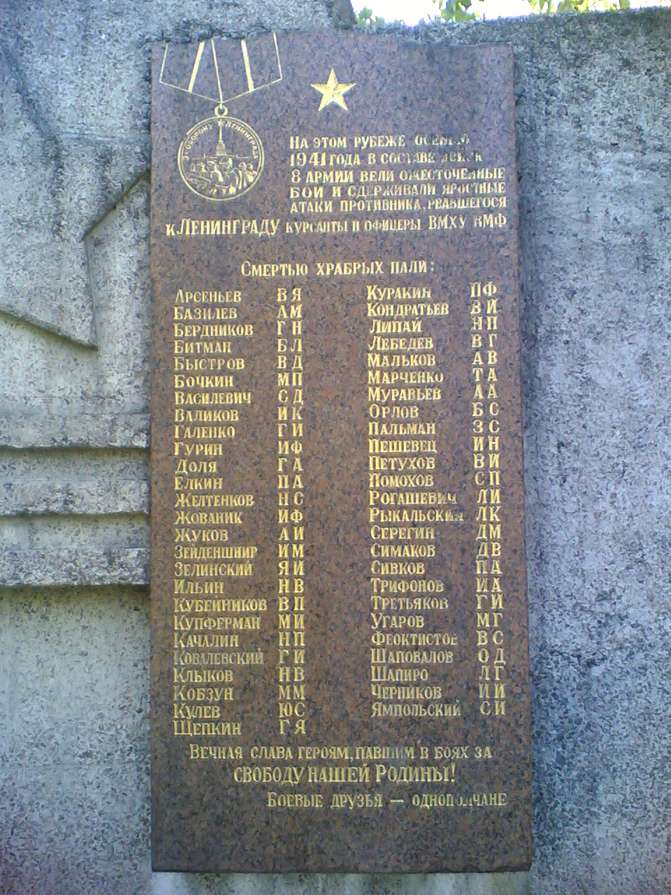 Главная мемориальная доска мемориала .